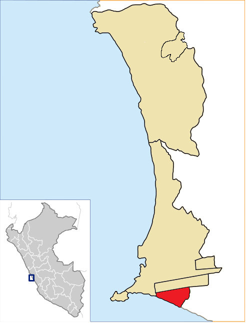 La Perla